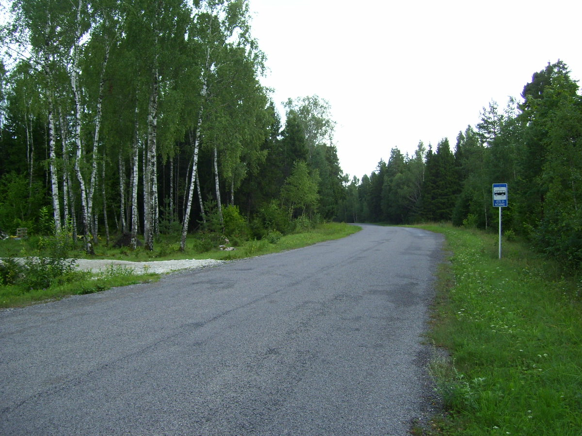 Pühalepa vald, Kõlunõmme küla, bussipeatus "Kõlunõmme", vaade Kukka poolt Kõlunõmme teeristi poole